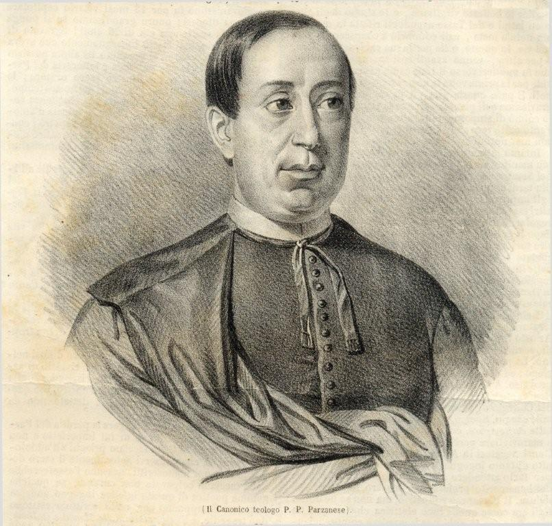 Incisione di Pietro Paolo Parzanese, pubblicata per il necrologio sul Poriorama Pittoresco, Napoli, 1852